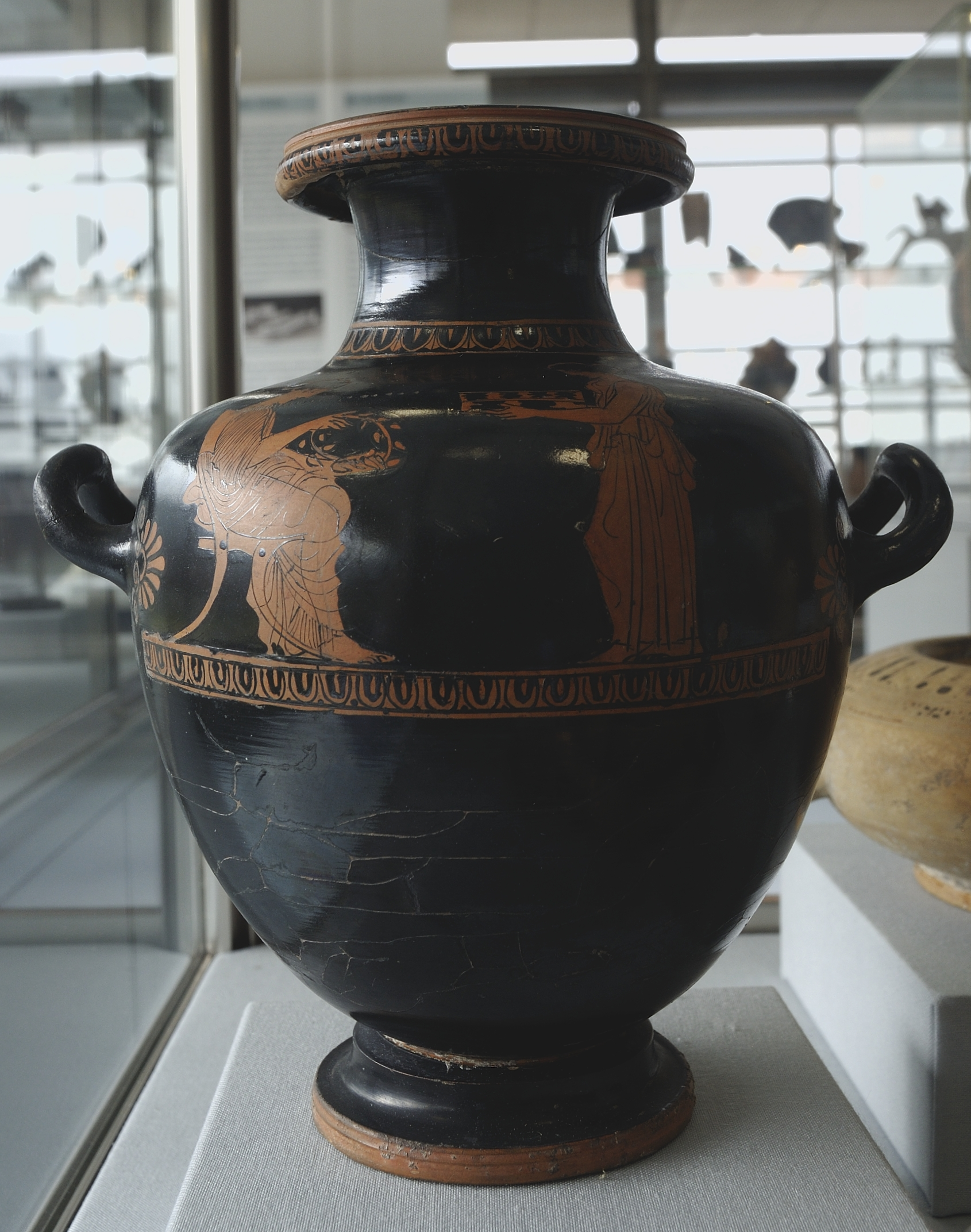 Hydria des Schuwalow-Malers aus Capua. Antikenmuseum der Universität Heidelberg.